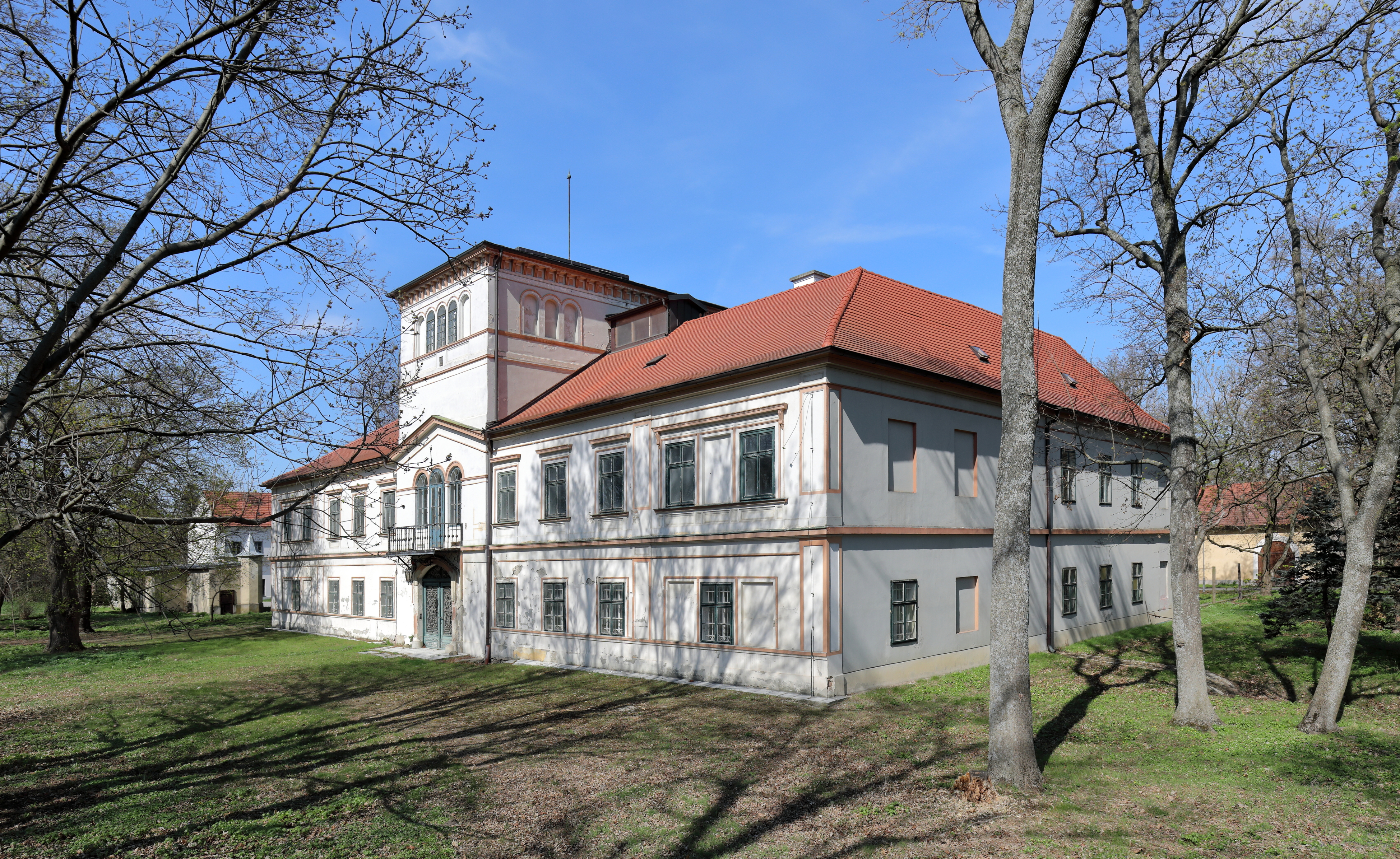 Südostansicht des Schlosses Süßenbrunn im 22. Wiener Bezirk Donaustadt.Der Vorgängerbau war ein Feste, die um Zuge der Türkenkriege (1529) zerstört wurde. Im letzten Viertel des 16. Jahrhunderts wird der Ort von Urban Sueß (Siess) neu besiedelt und das Schloss errichtet. Das Hauptgebäude ist eine zweigeschossige U-förmige Anlage unter Walmdächern mit Turm und hinterem Ehrenhof. Mitte des 19. Jahrhunderts wurde die Hauptfassade im frühhistorischen Stil neu fassadiert.